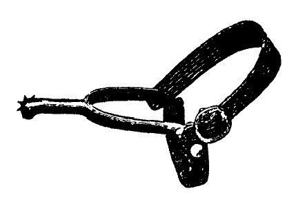 Spännsporre, svenska arméns modell från 1895